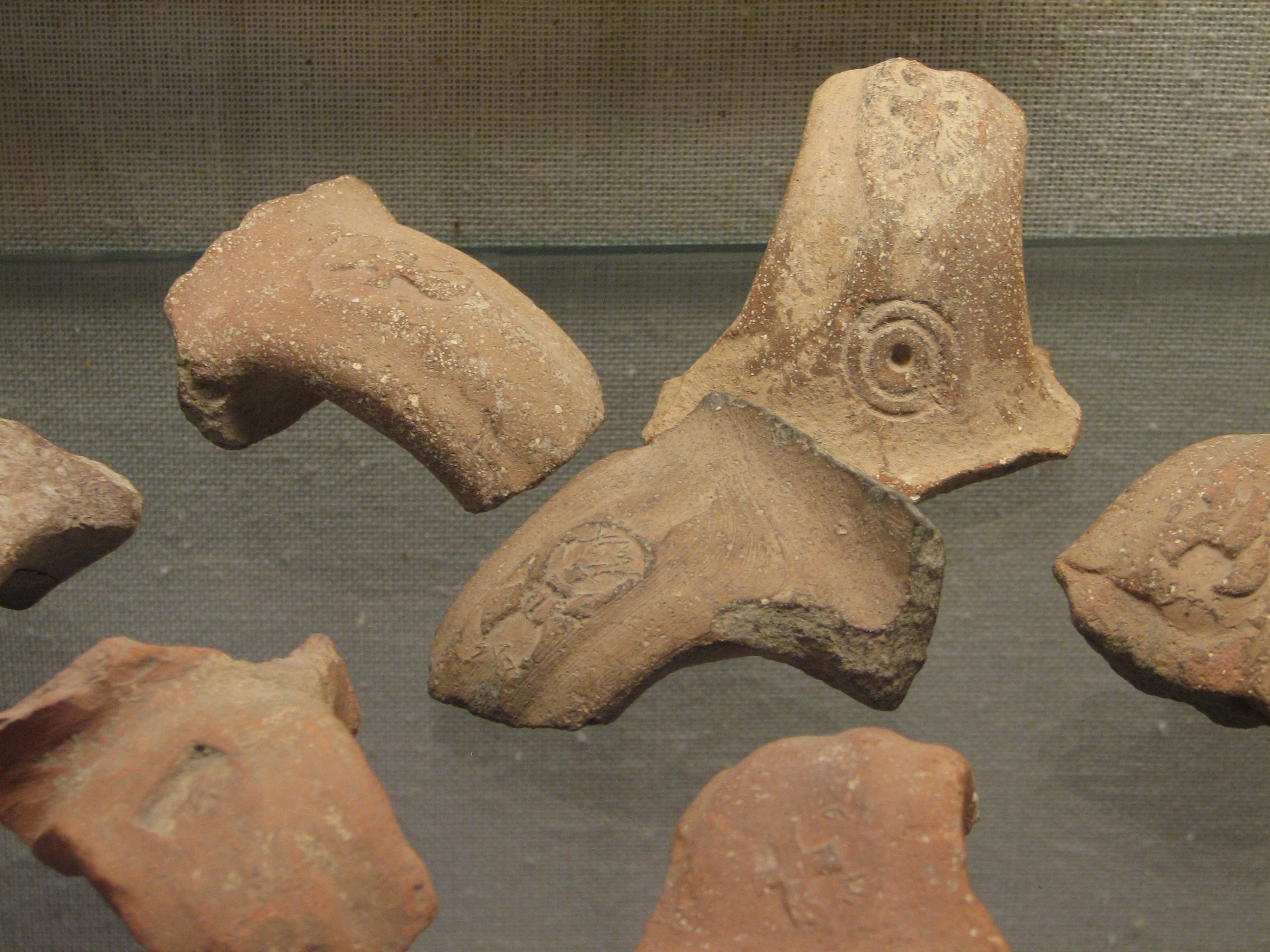 LMLK seals were stamped on the handles of large storage jars mostly in and around Jerusalem during the reign of King Hezekiah (circa 700 BC) in Hecht Museum, Israel חותמות לַמֶּלֶךְ הוא כינוי שניתן לידיות קנקני אגירה שבהן הוטבעה הכתובת "למלך" בעזרת חותמות. ההטבעה נמצאה על מספר גדול של קנקני אגירה (כ-2,000 קנקנים) שנמצאו באזור יהודה, ובמיוחד סביב ירושלים, והמתוארכים לדעת רוב החוקרים לתקופת מלכותו של חזקיהו מלך יהודה שמלך במאה ה-8 ותחילת המאה ה-7 לפנה"ס במוזיאון הכט באוניברסיטת חיפה